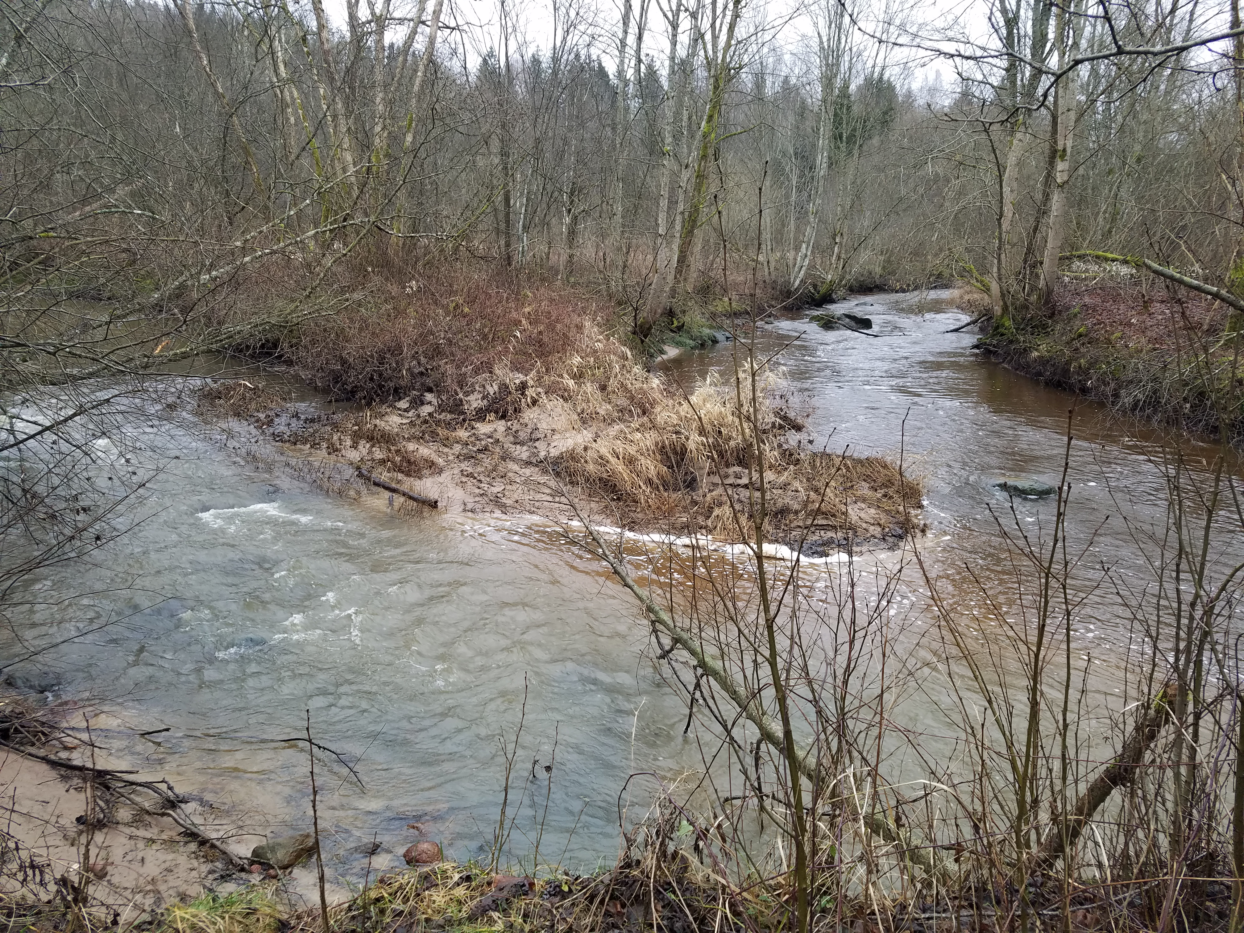 Santaka su Alantu